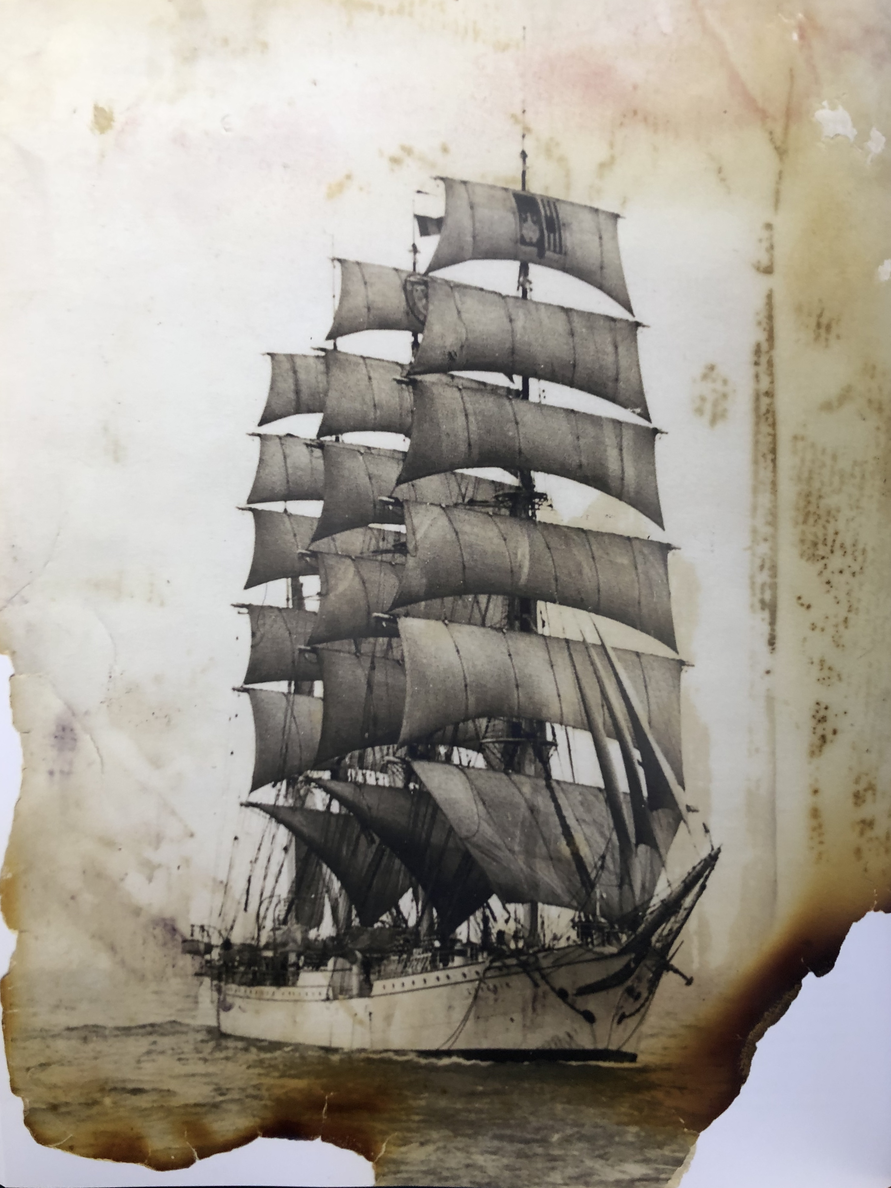 Foto uit het familiearchief van de Familie Meulemeester. Gered uit een brand tijdens oorlogshandelingen aan het eind van de Duitse bezetting na WOII.�